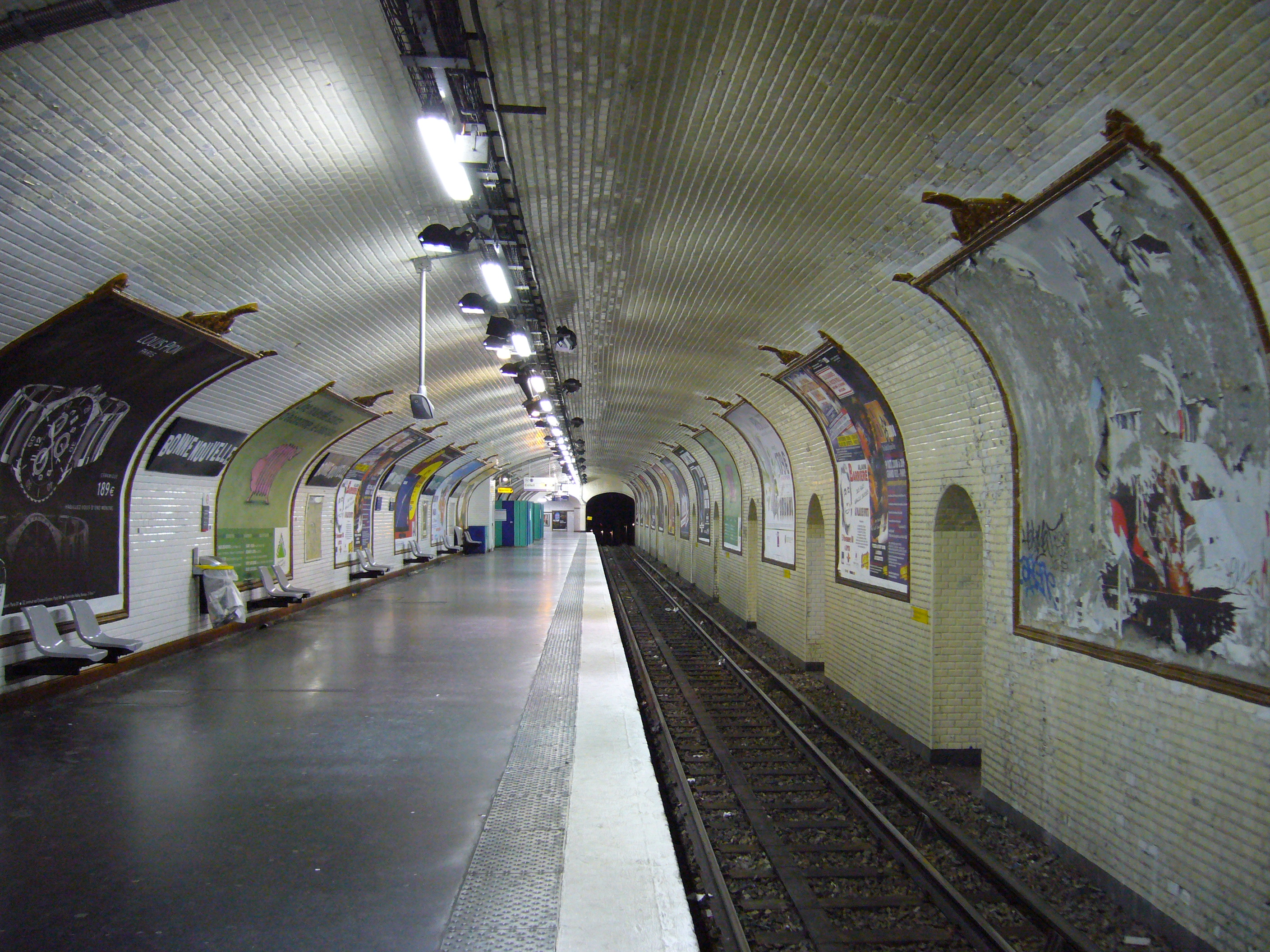 Vue de la station Bonne Nouvelle sur la ligne 8 du métro de Paris.